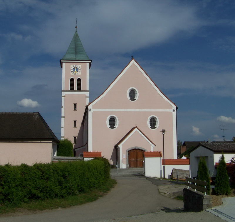 Pfarrkirche St. Vitus Kirchroth. Das Untergeschoss des Turmes ist gotisch. Das Langhaus und die Obergeschosse des Turmes stammen aus der Mitte des 17. Jahrhunderts.